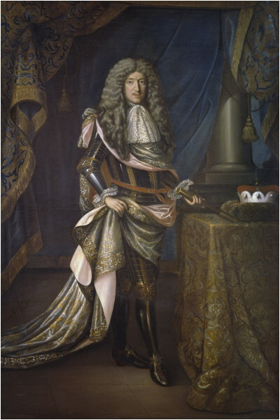 vévoda krumlovský